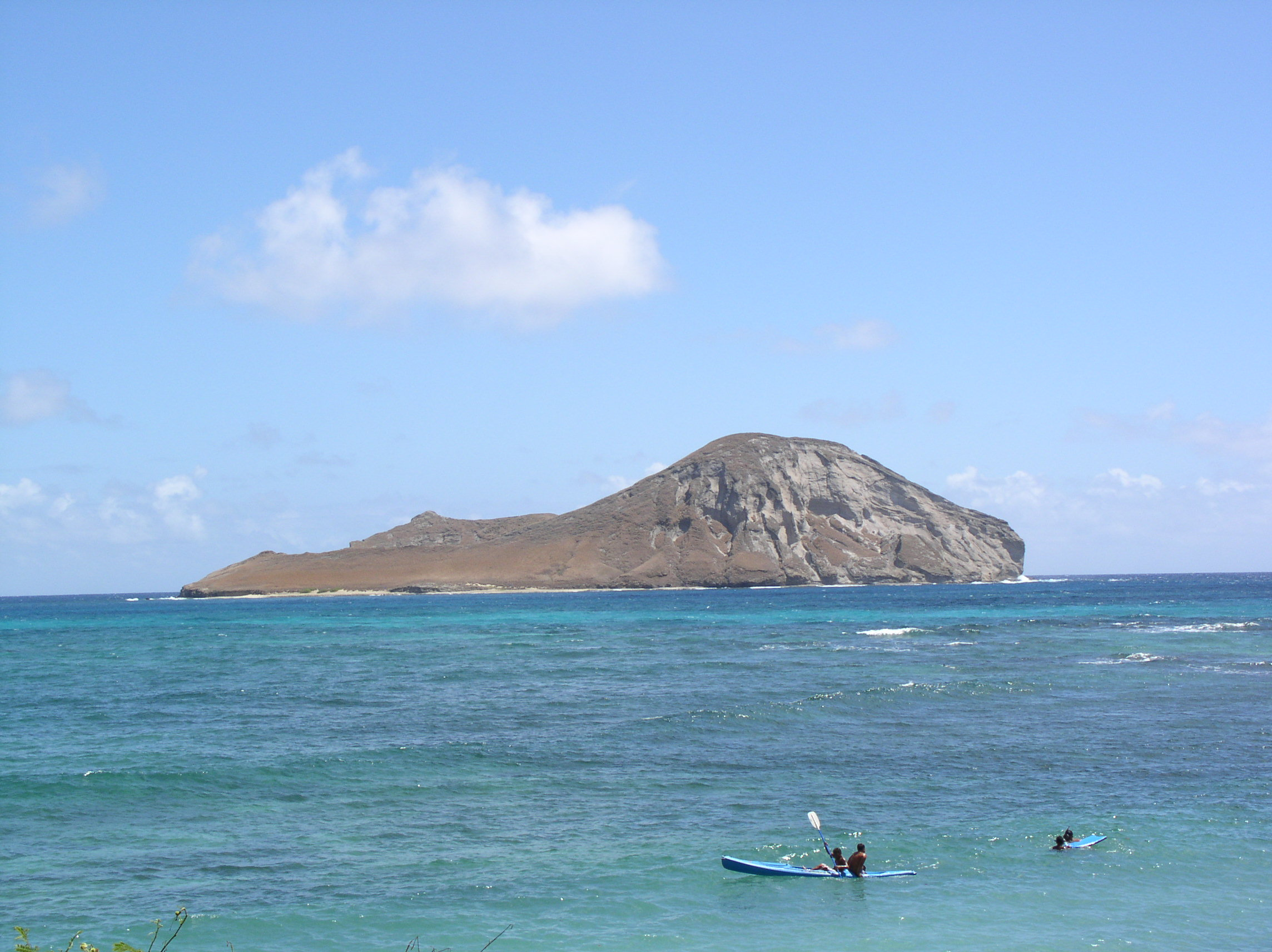 Rabbit Island aka Manana. On island of Oahu in Hawaii